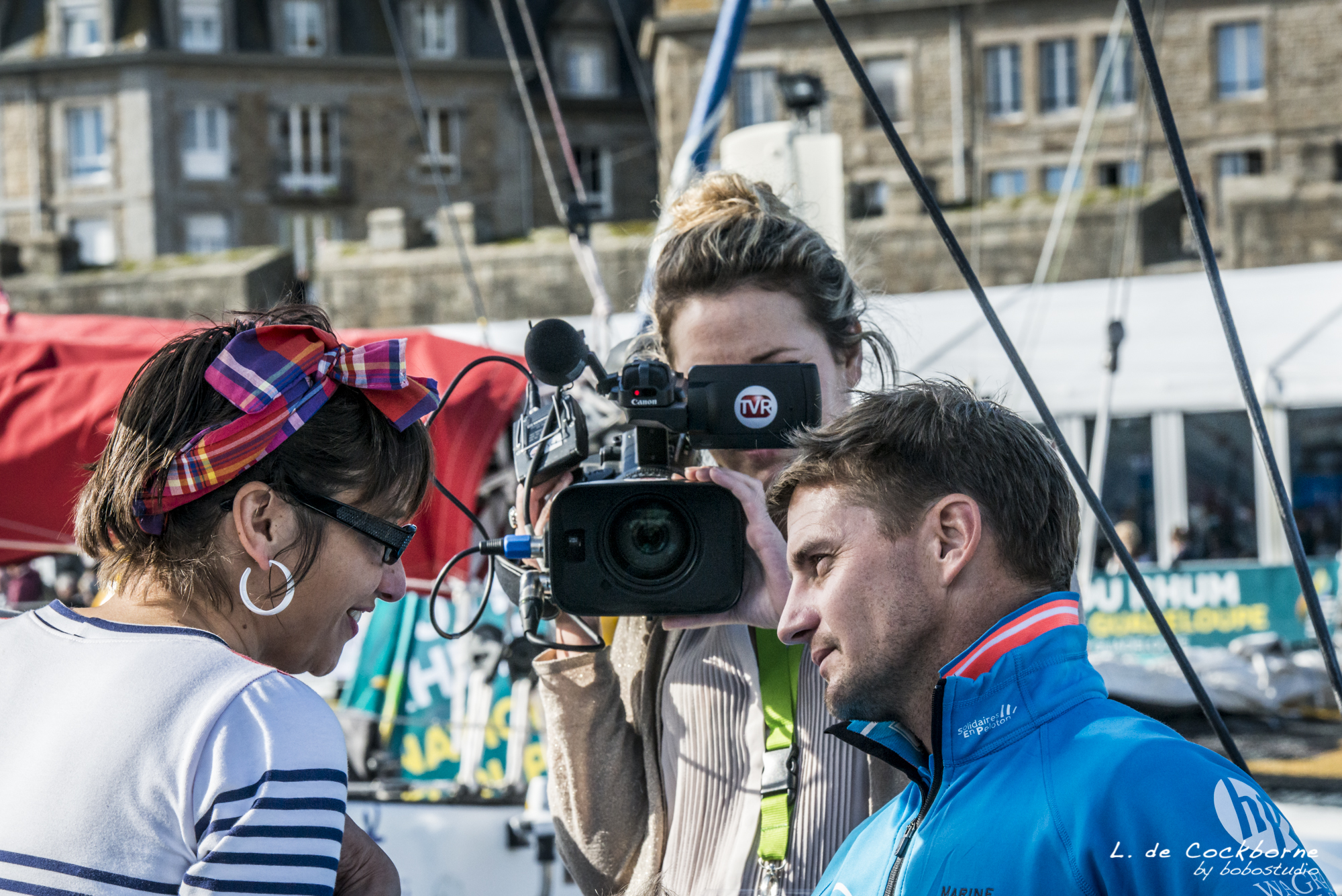 Thibaut VAUCHEL-CAMUS - Route du Rhum 2014